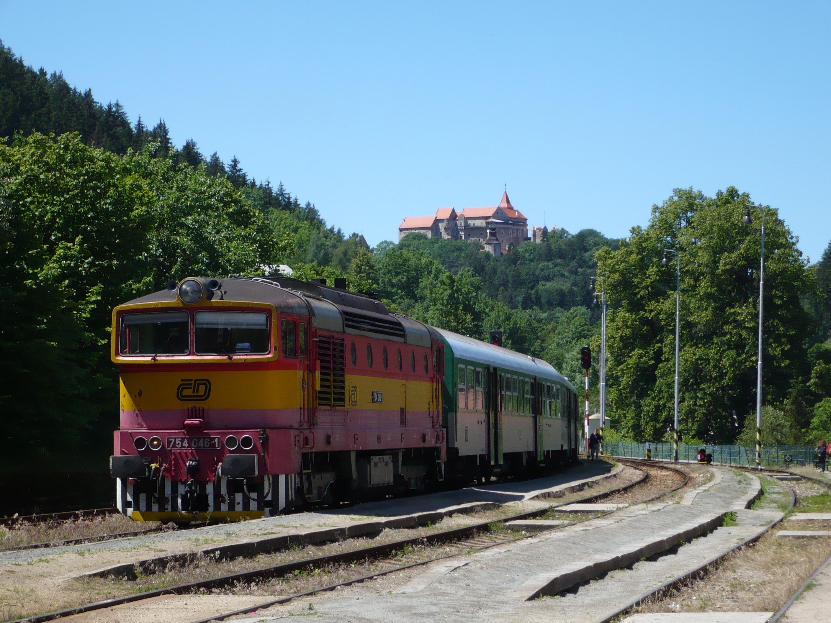 Osobní vlak č. 14911 tažený lokomotivou 754 046-1 čeká ve stanici Nedvědice na křižování s osobním vlakem 14908. V pozadí hrad Pernštejn